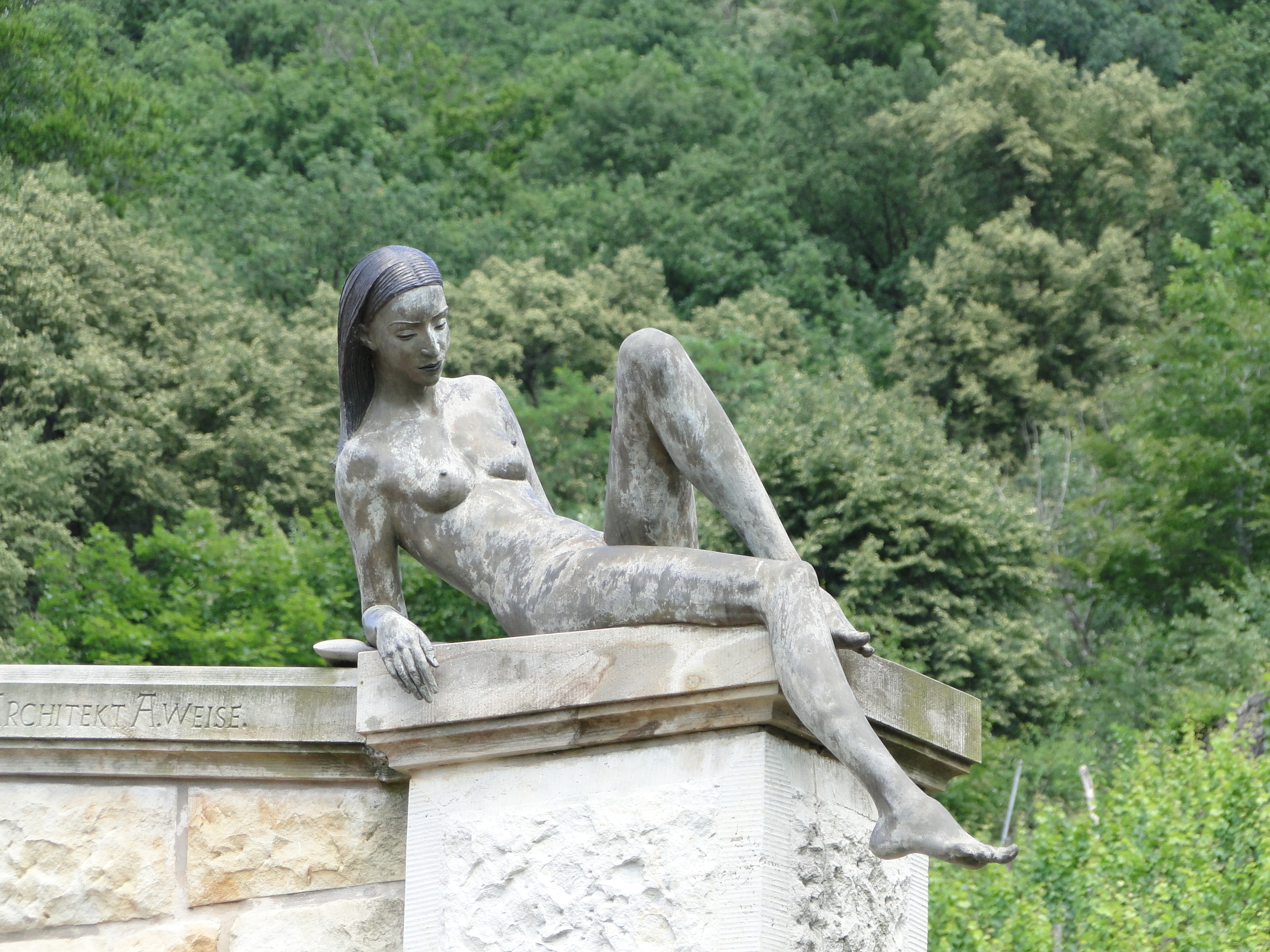 Skulptur von Malgorzata Chodakowska am Bergweg in Dresden, Weingut Zimmerling